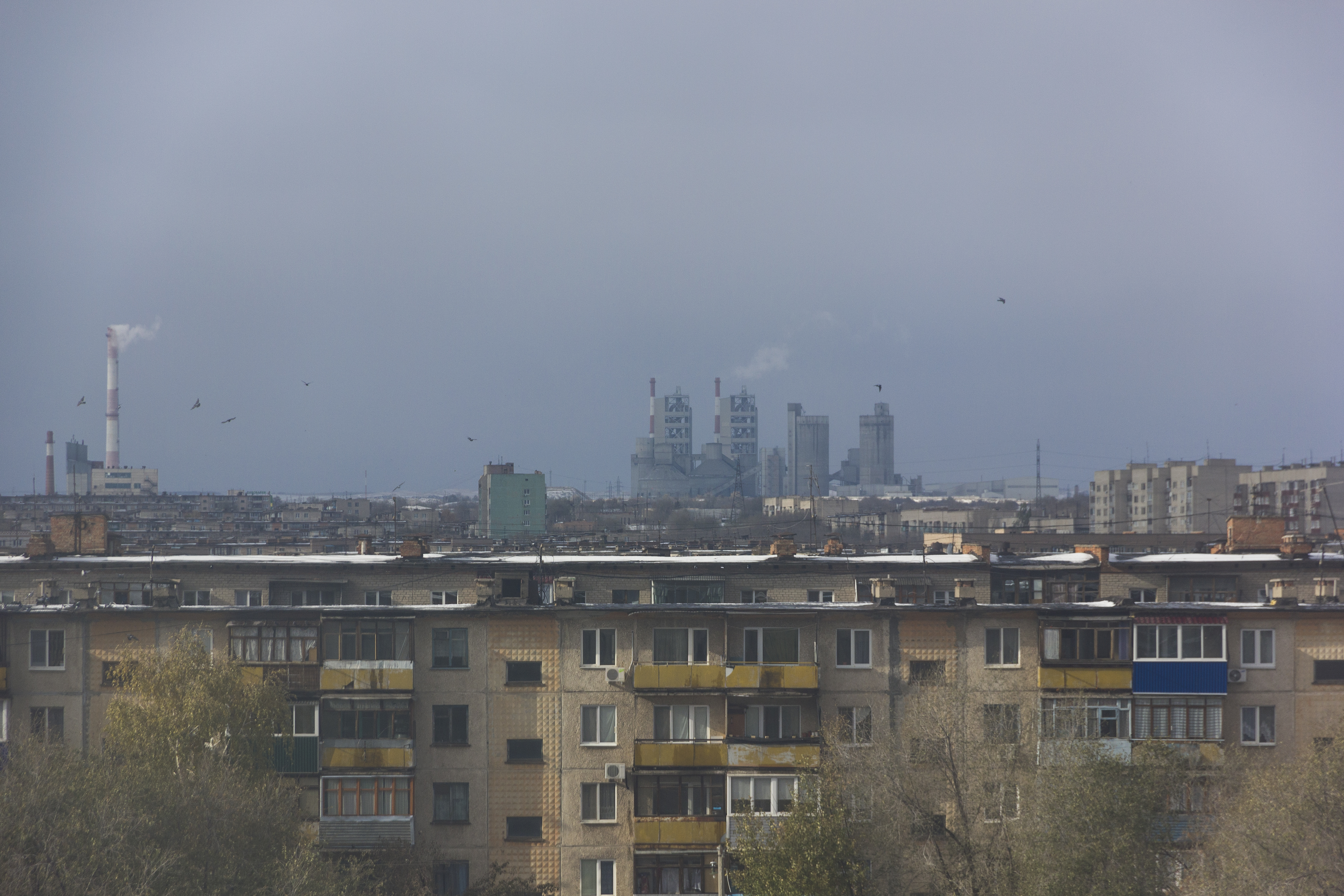 Моногород Новотроицк